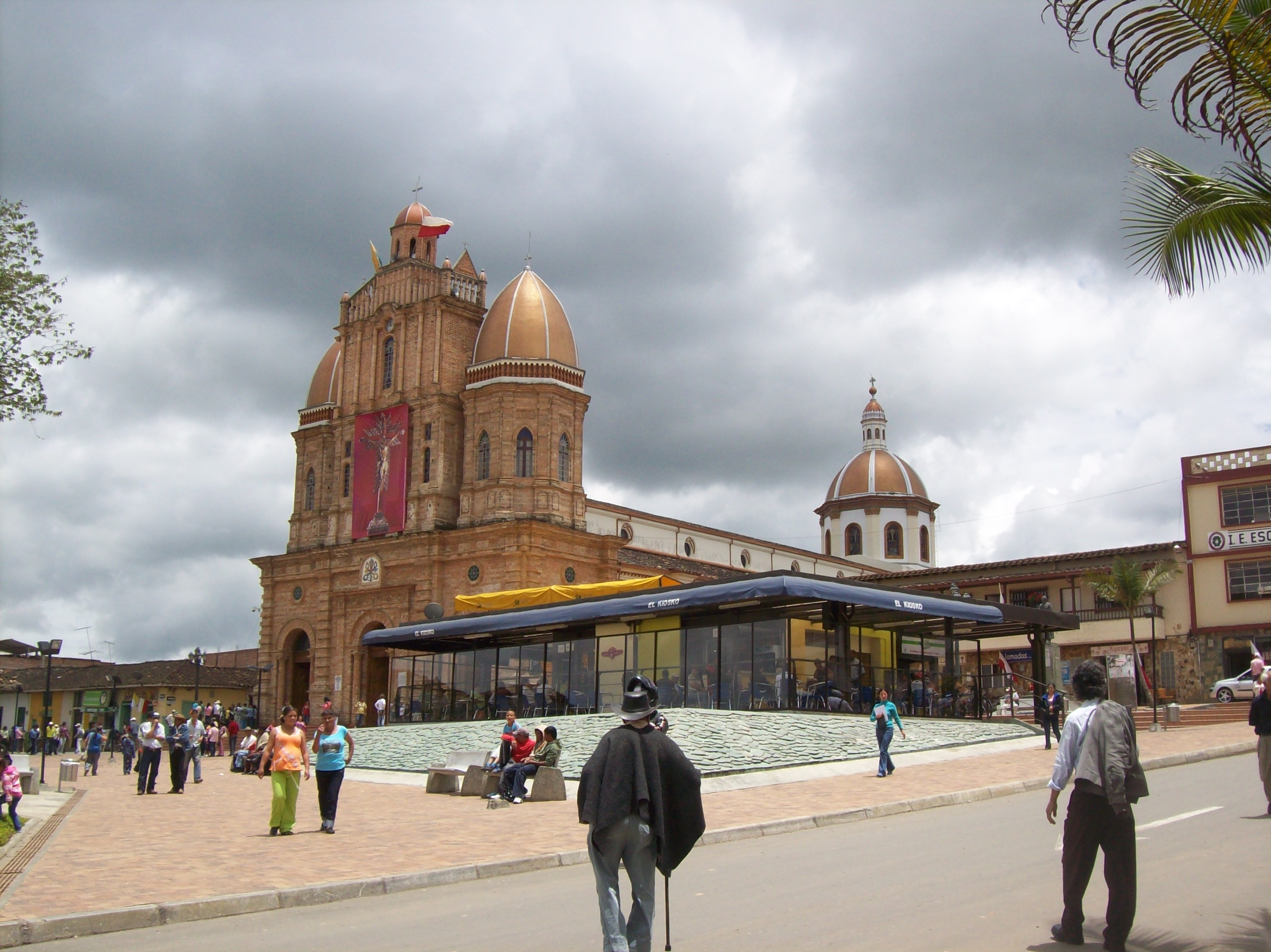 Parque principal de San Pedro de los Milagros.